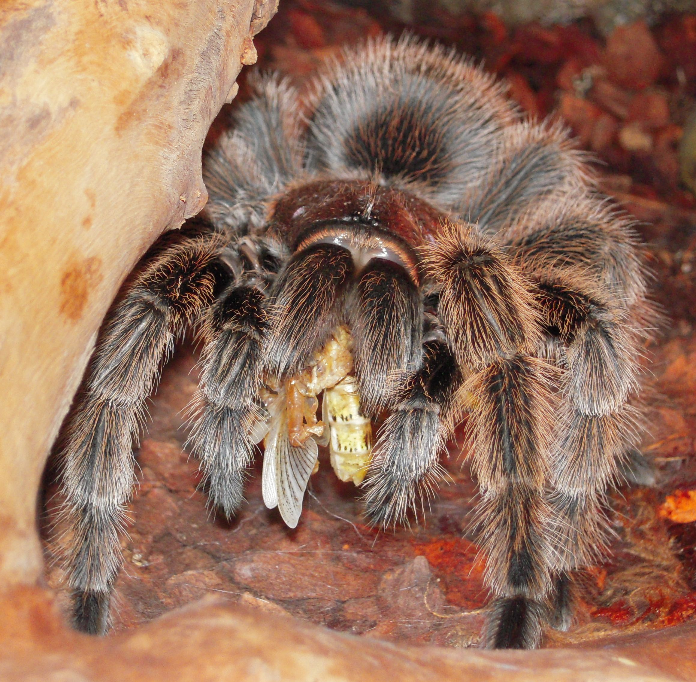 Grammostola cf. porteri bei der Nahrungsaufnahme.